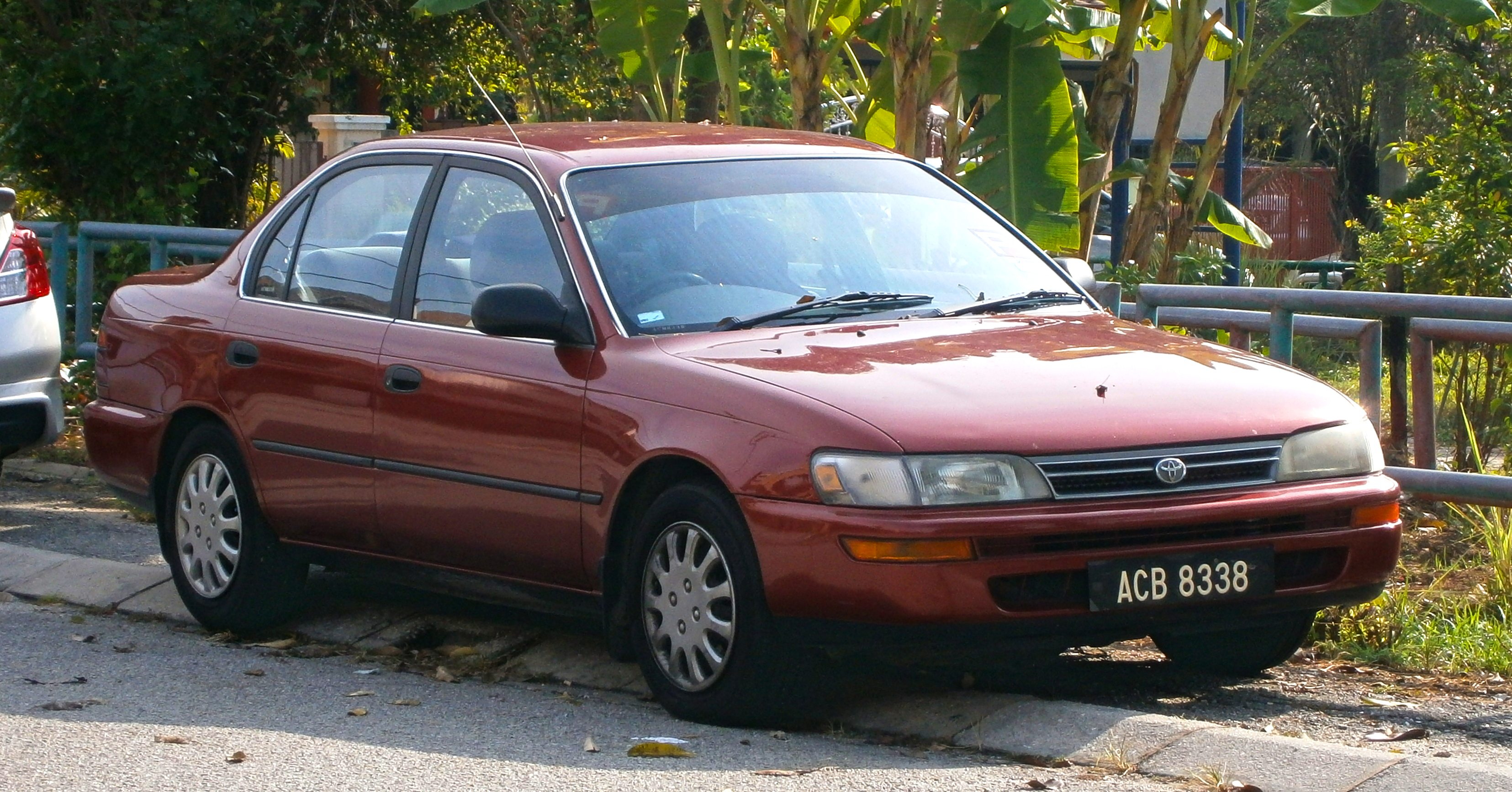 1992 Toyota Corolla (E100) 4-door sedan